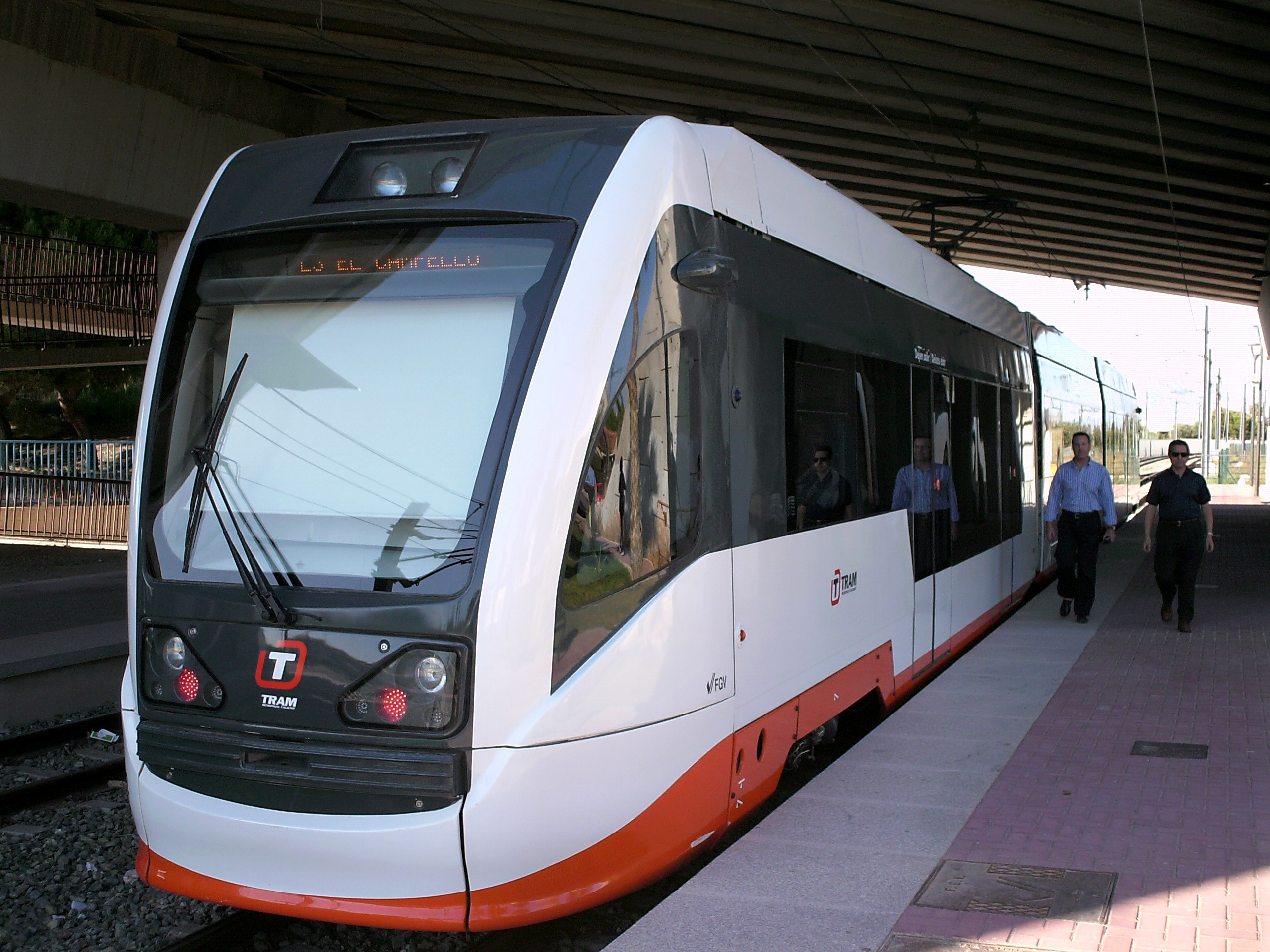 »Citylink«-Triebwagen auf der Linie 3 der Stadtbahn Alicante im Bahnhof Lucentum, Nachschuss Richtung El Campello